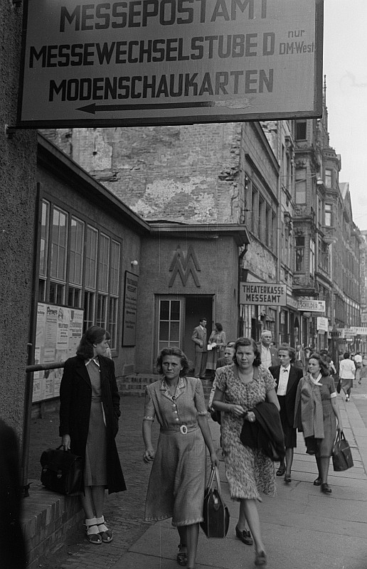 Original image description from the Deutsche Fotothek Renate Rössing vor der Wechselstube für "DM-West" sowie Besucher der Leipziger Herbstmesse